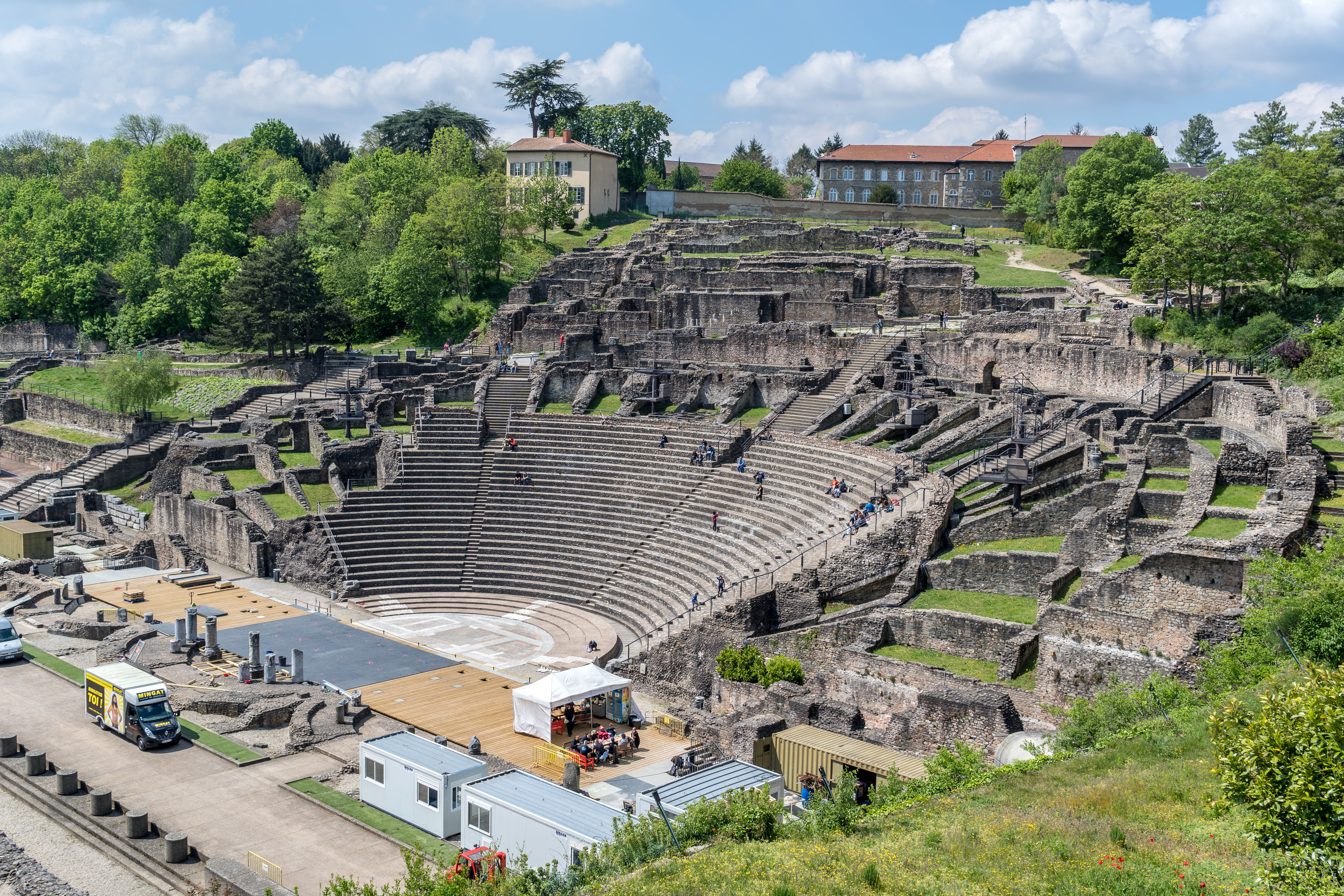 Lyon - Lugdunum - Théatre Romain